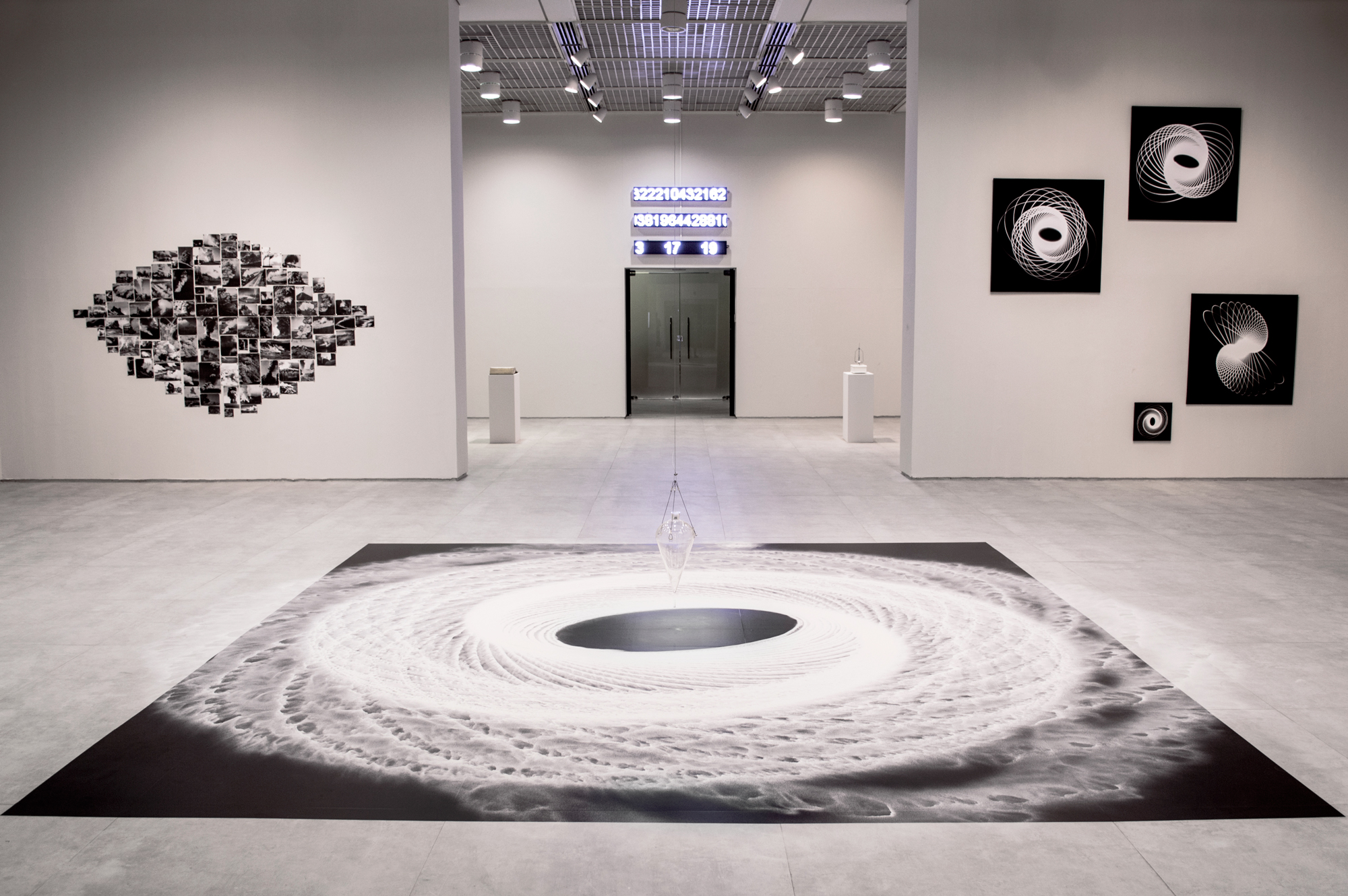 Vista Geral da exposição IMENSURÁVEL de Felippe Moraes com curadoria de Alexandre Sá na Caixa Cultural de Fortaleza em 2018. AA imagem apresenta em primeiro plano a obra "Movimento Pendular" (2014), à direita "Hermes" (2011), à esquerda fotografias da série "Movimento Pendular" (2015-17) e ao fundo as obras "π" (2016), "φ" (2016) e "Primos" (2016). Foto de Felippe Moraes